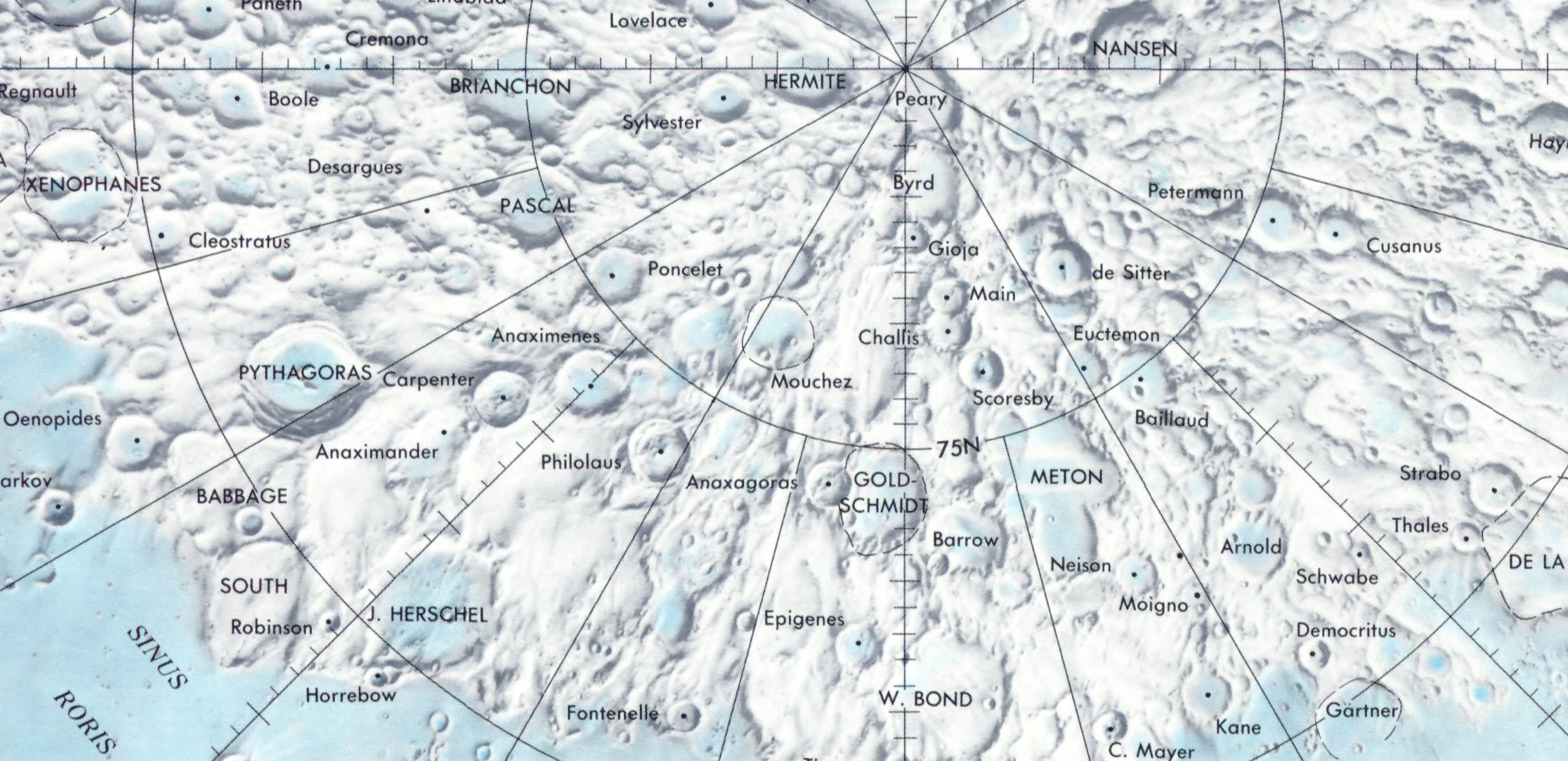 Cráter lunar Babbage. Localización. (Lunar Chart LPC1. Second Edition)